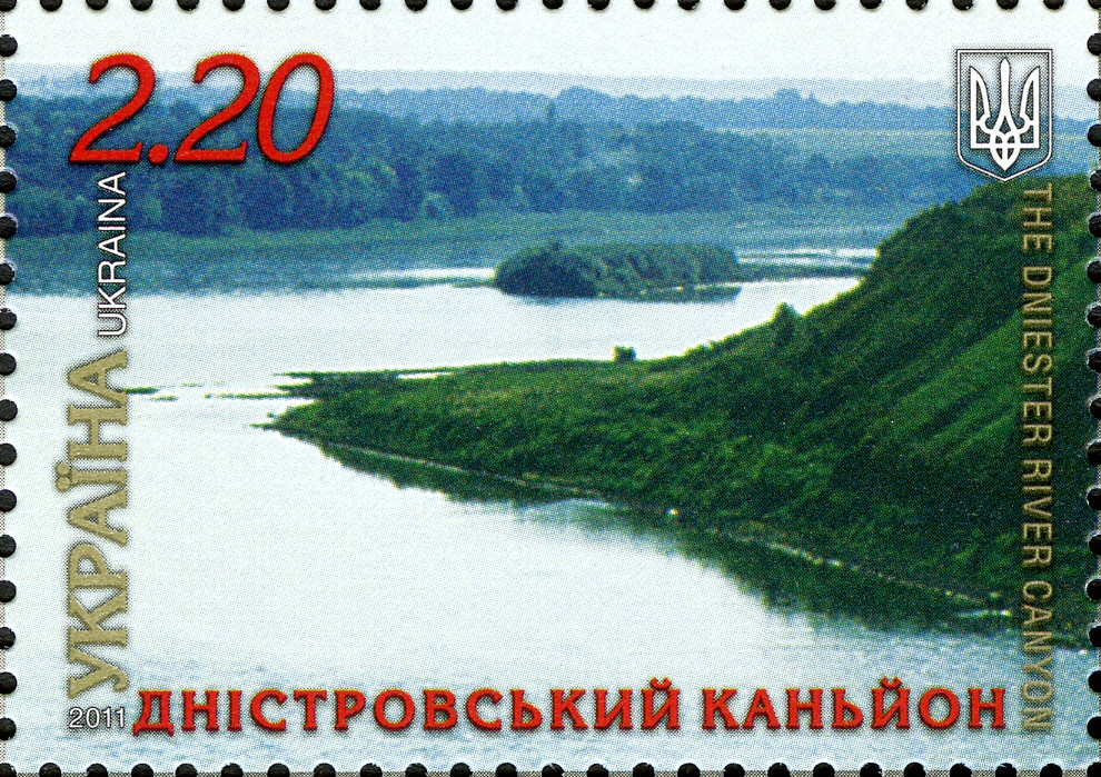 Дністровський каньйон на марці, присвяченій проекту "Сім природніх чудес України"